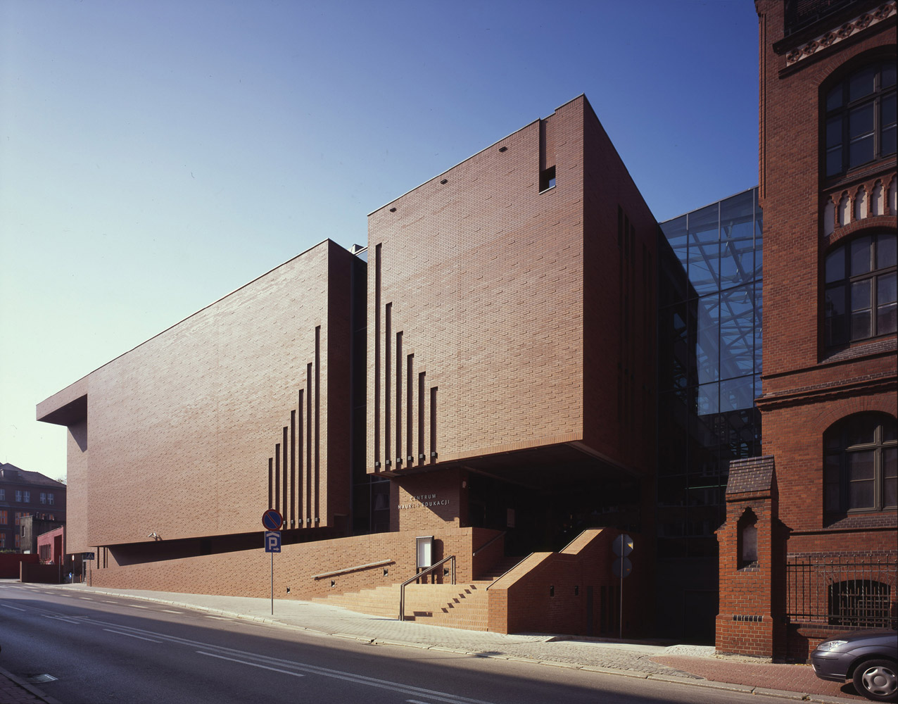 Centrum Edukacji Muzycznej SYMFONIA w Katowicach